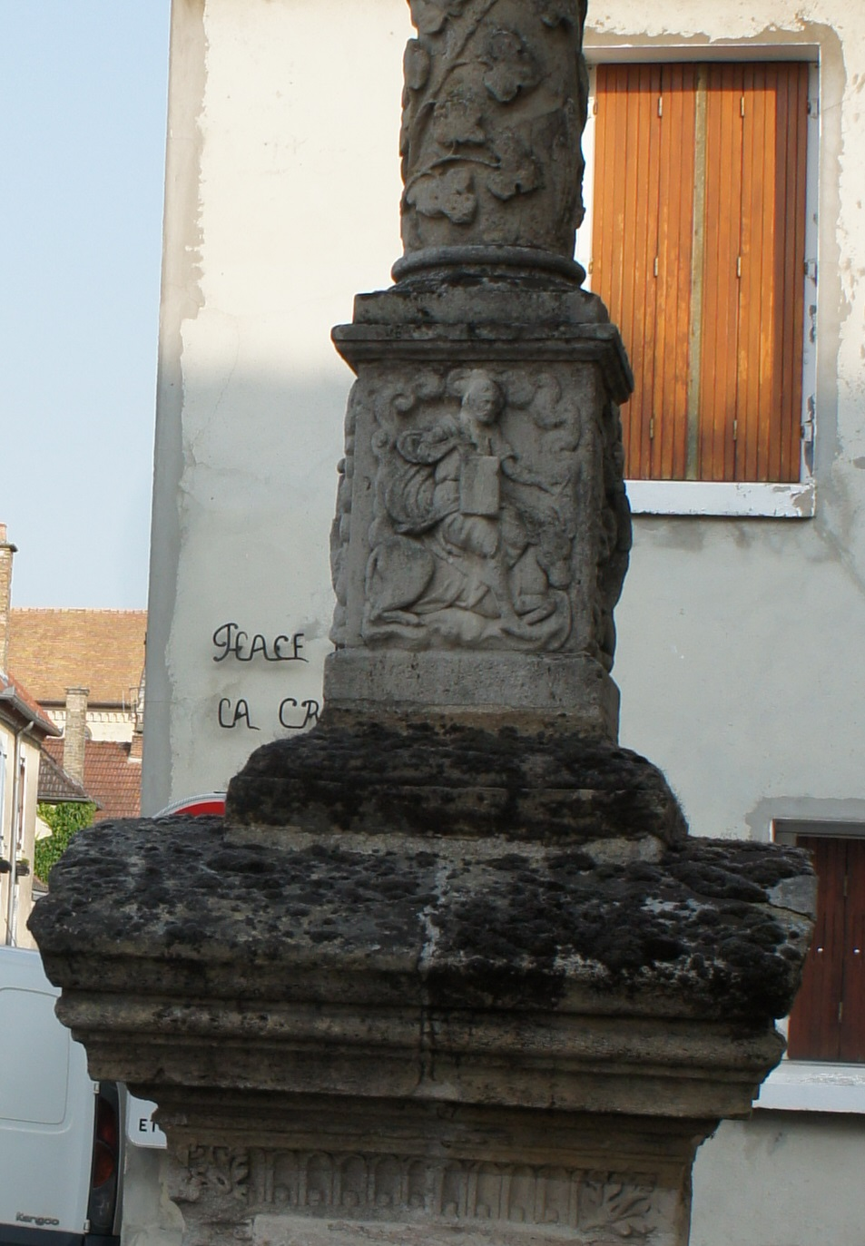 Place du marché .